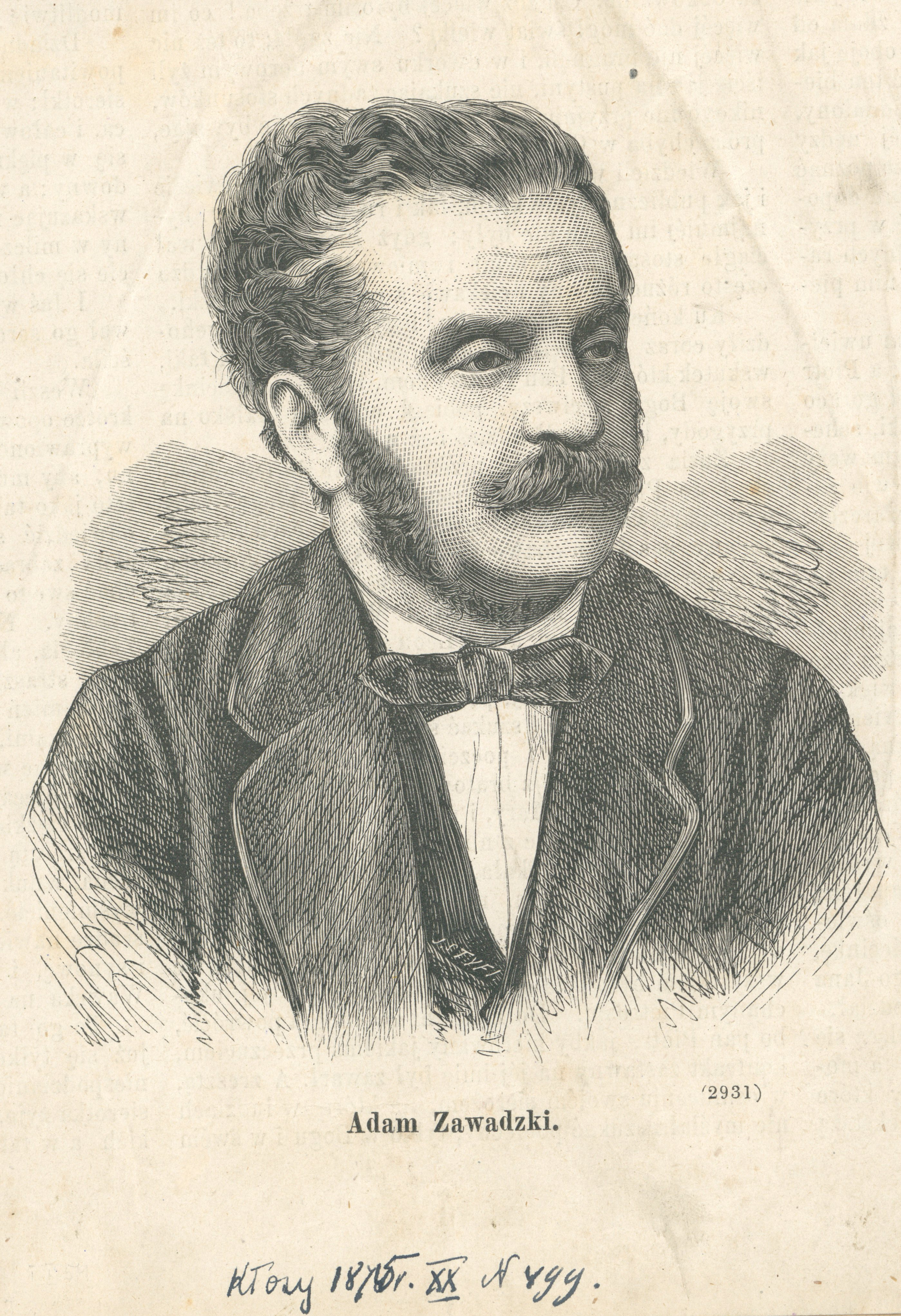 Adam Zawadzki